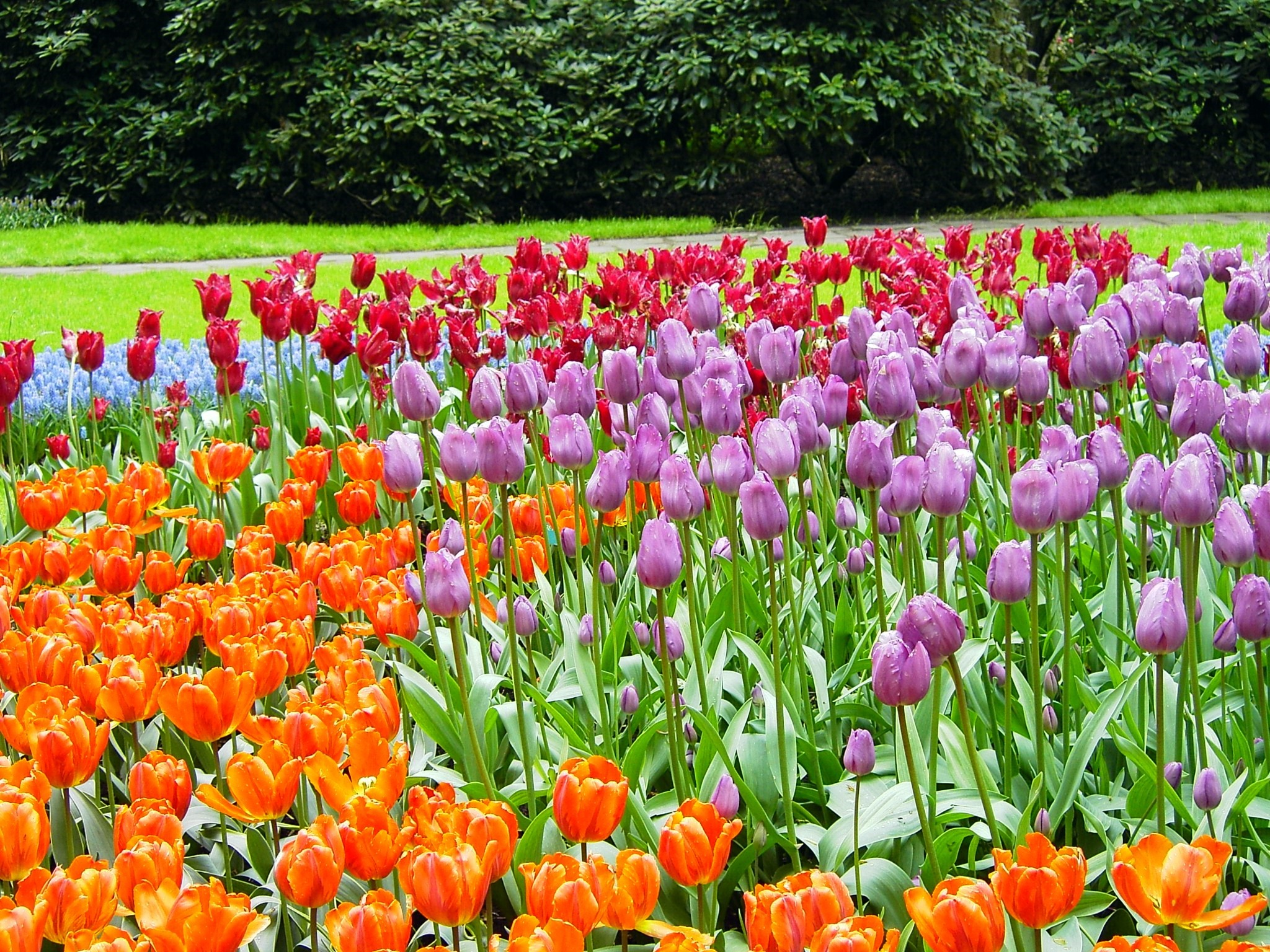 Parque Keukenhof